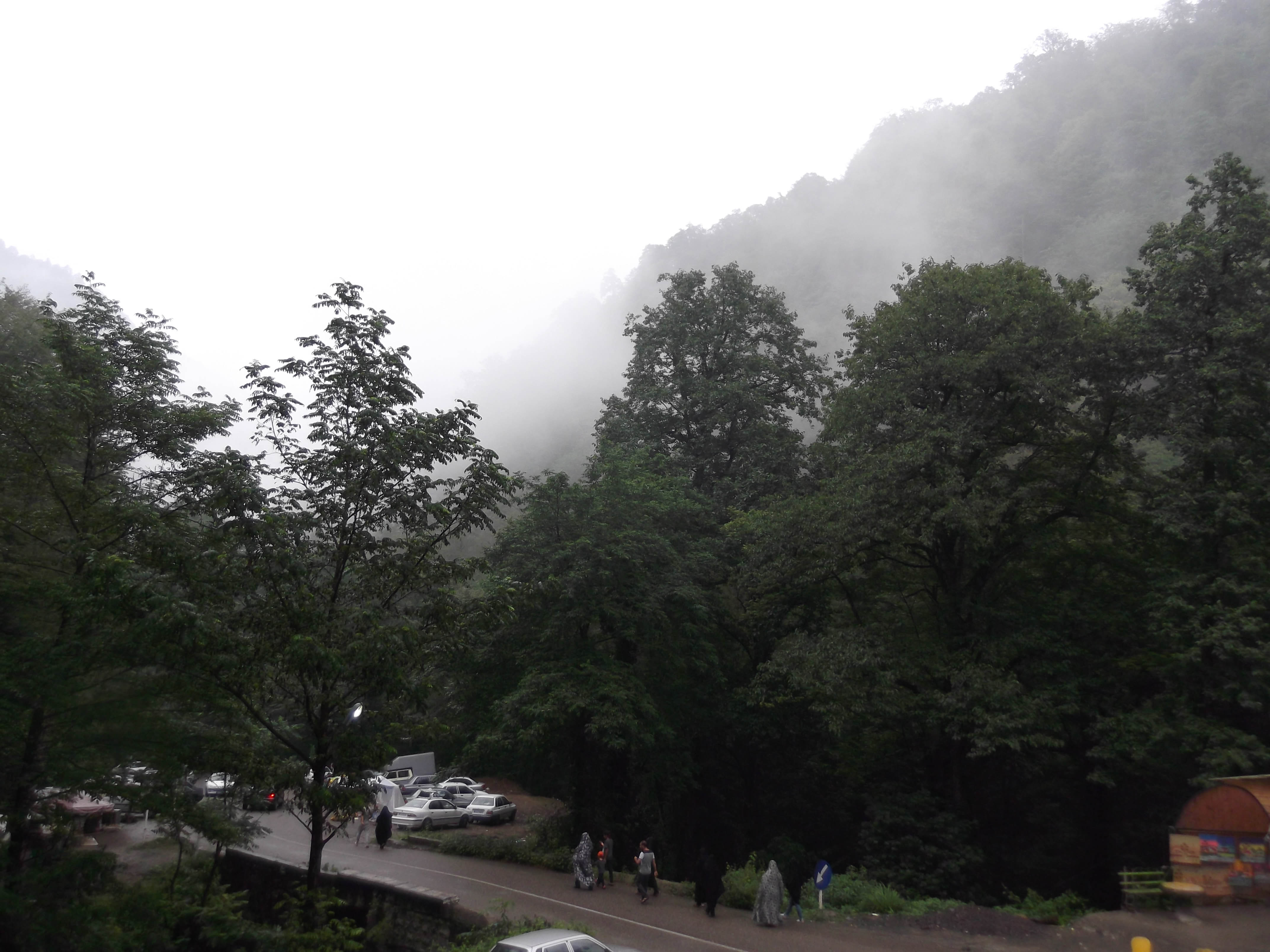 جنگل لونک، واقع در شهرستان سیاهکل